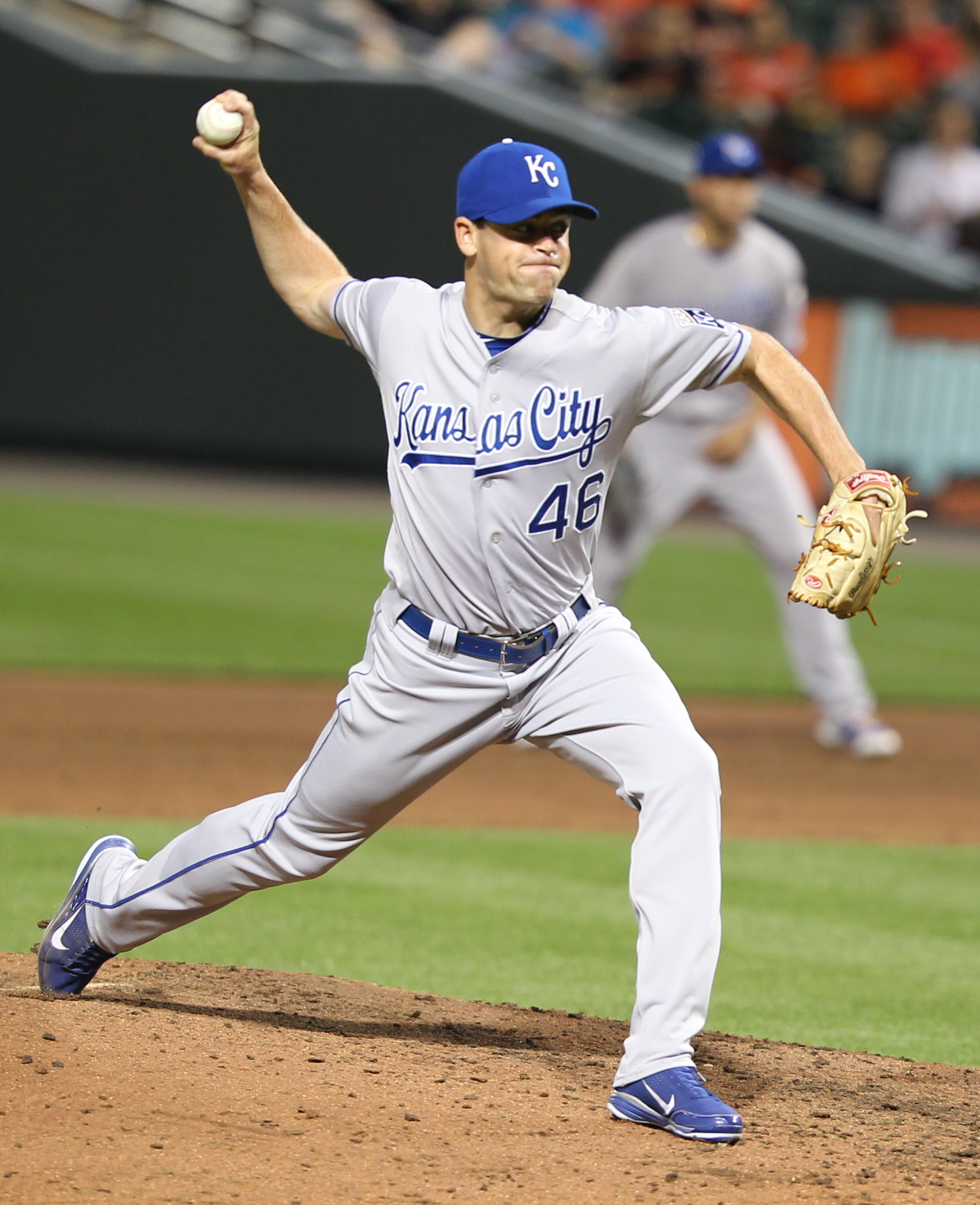 Louis Coleman